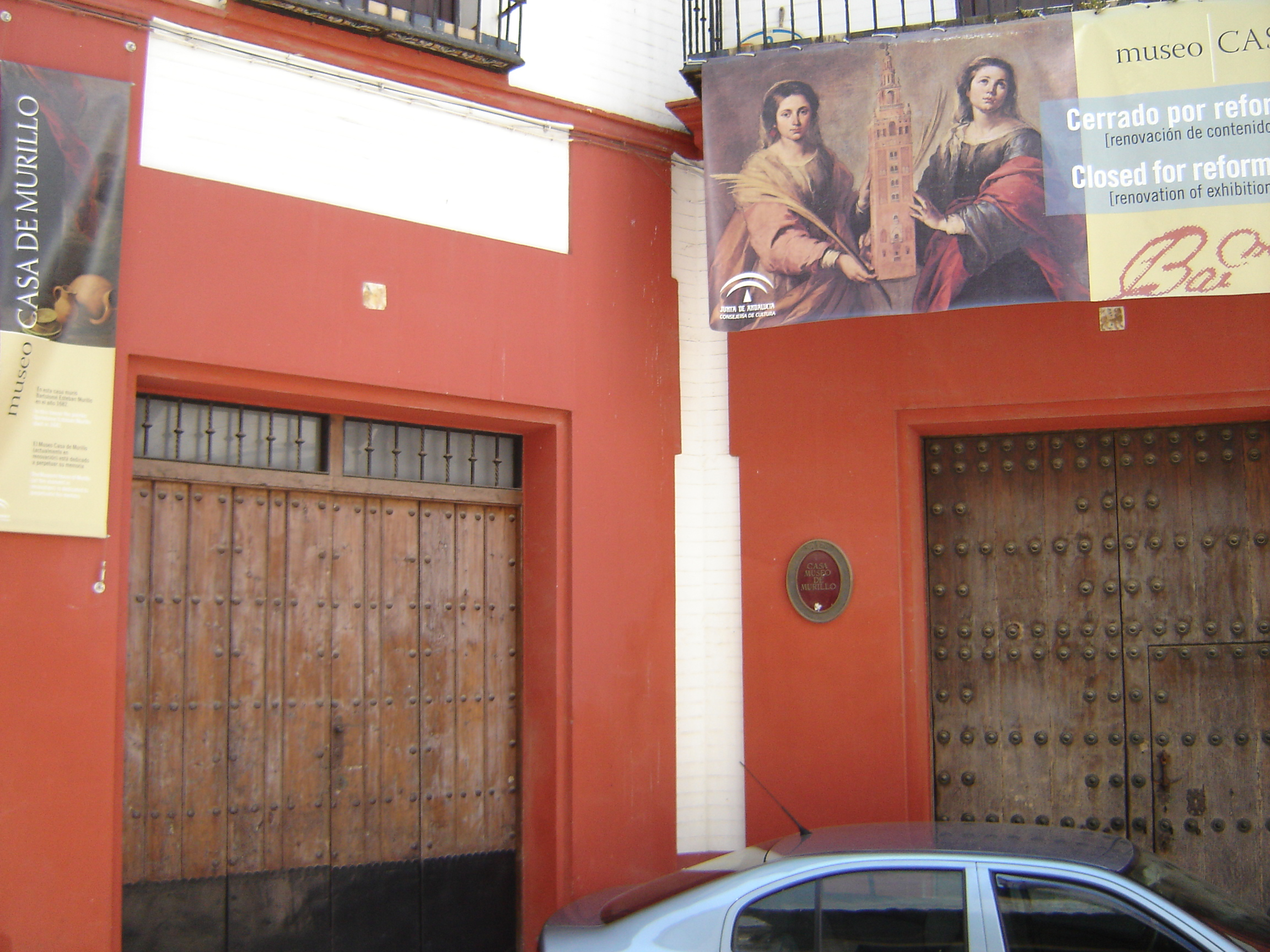 Casa Museo de Murillo (Sevilla).